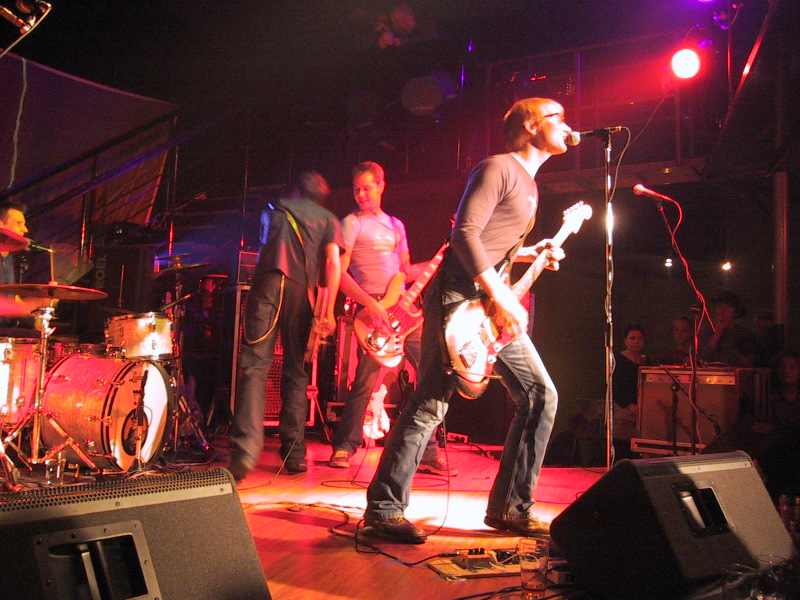 Lasse Kurki.